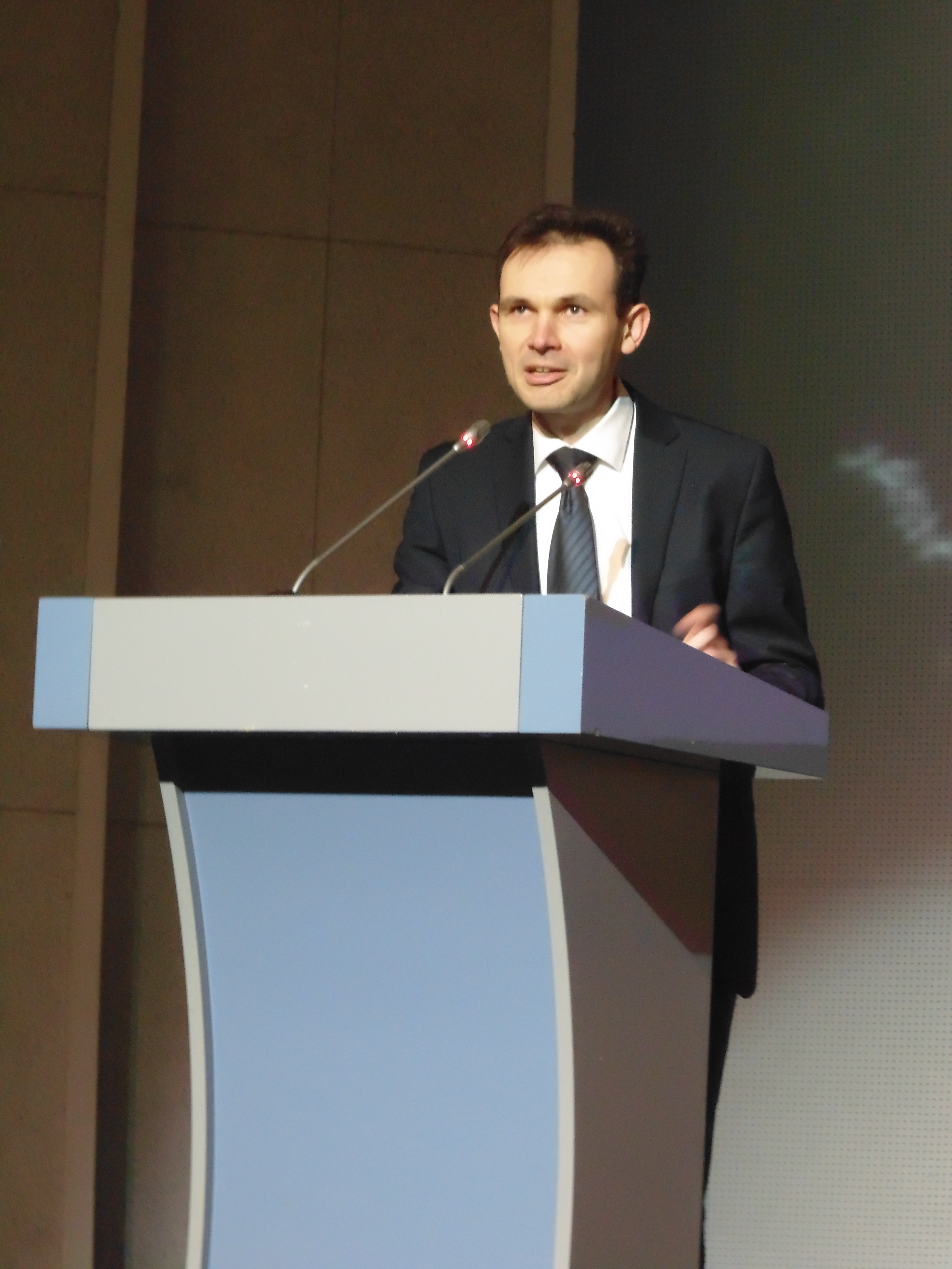 Лаврик Олег Васильович